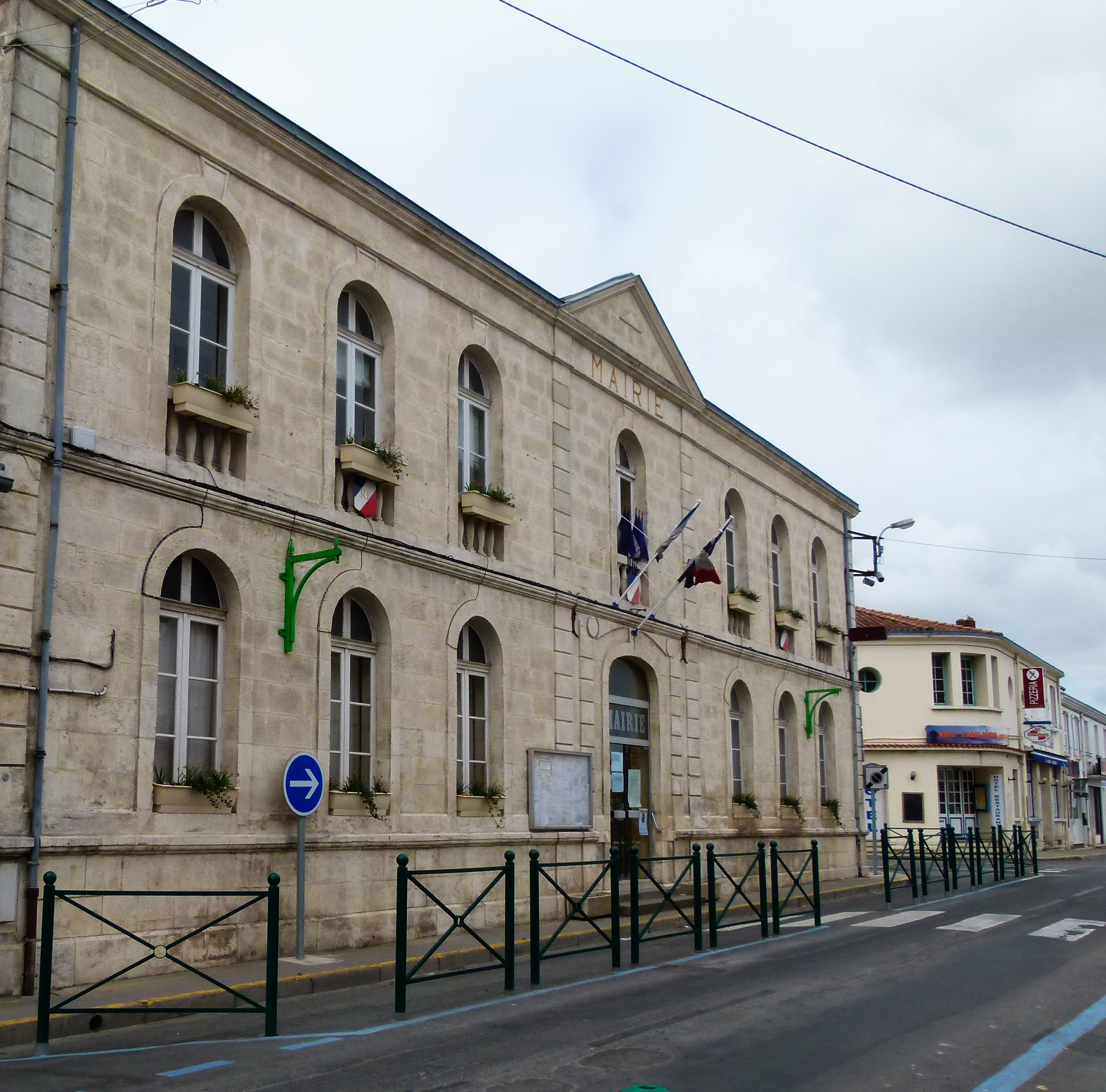 La mairie d'Aigrefeuille-d'Aunis a été inaugurée en 1870.